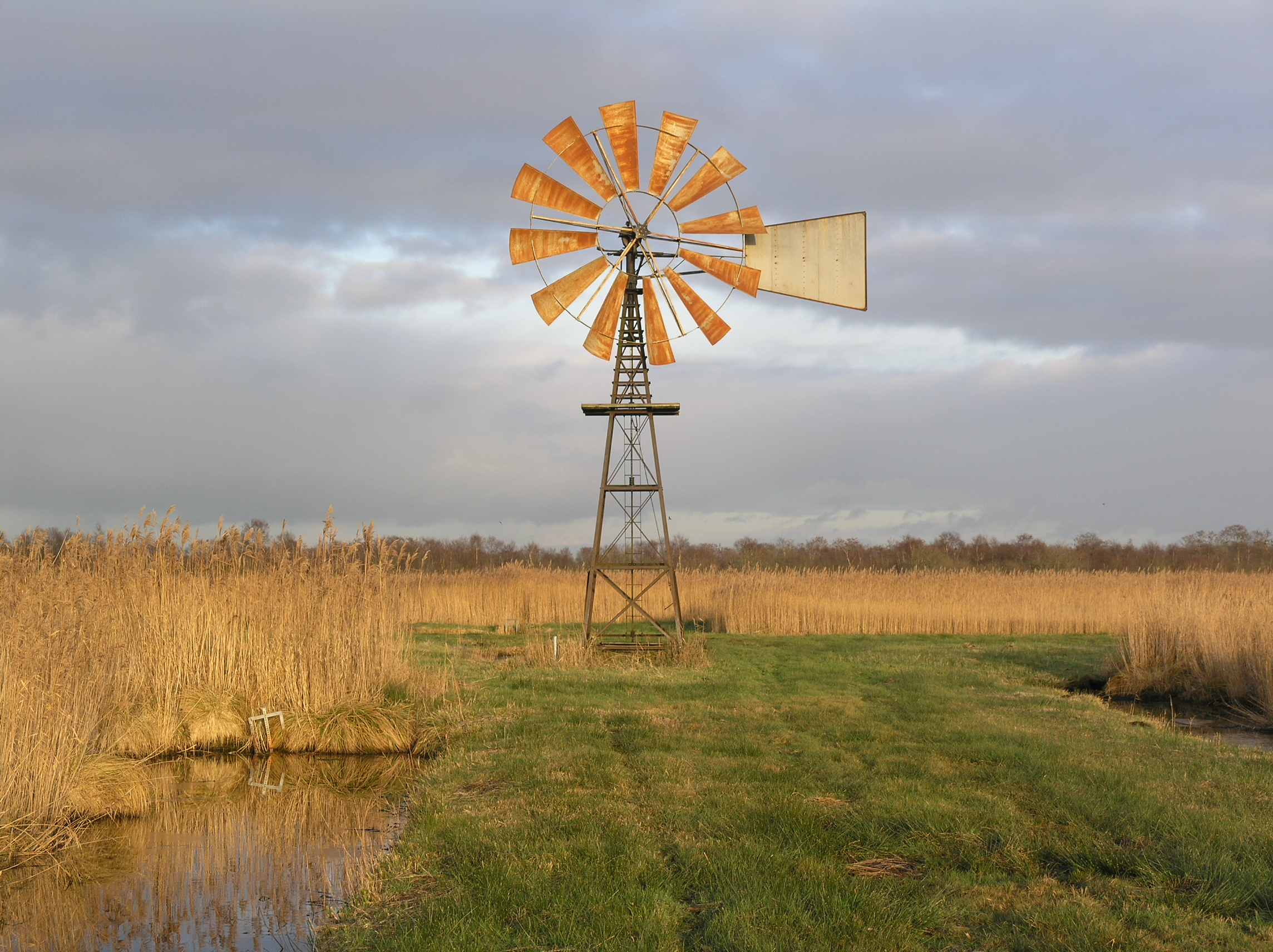 Nijetrijne Windmotor Rottige Meente